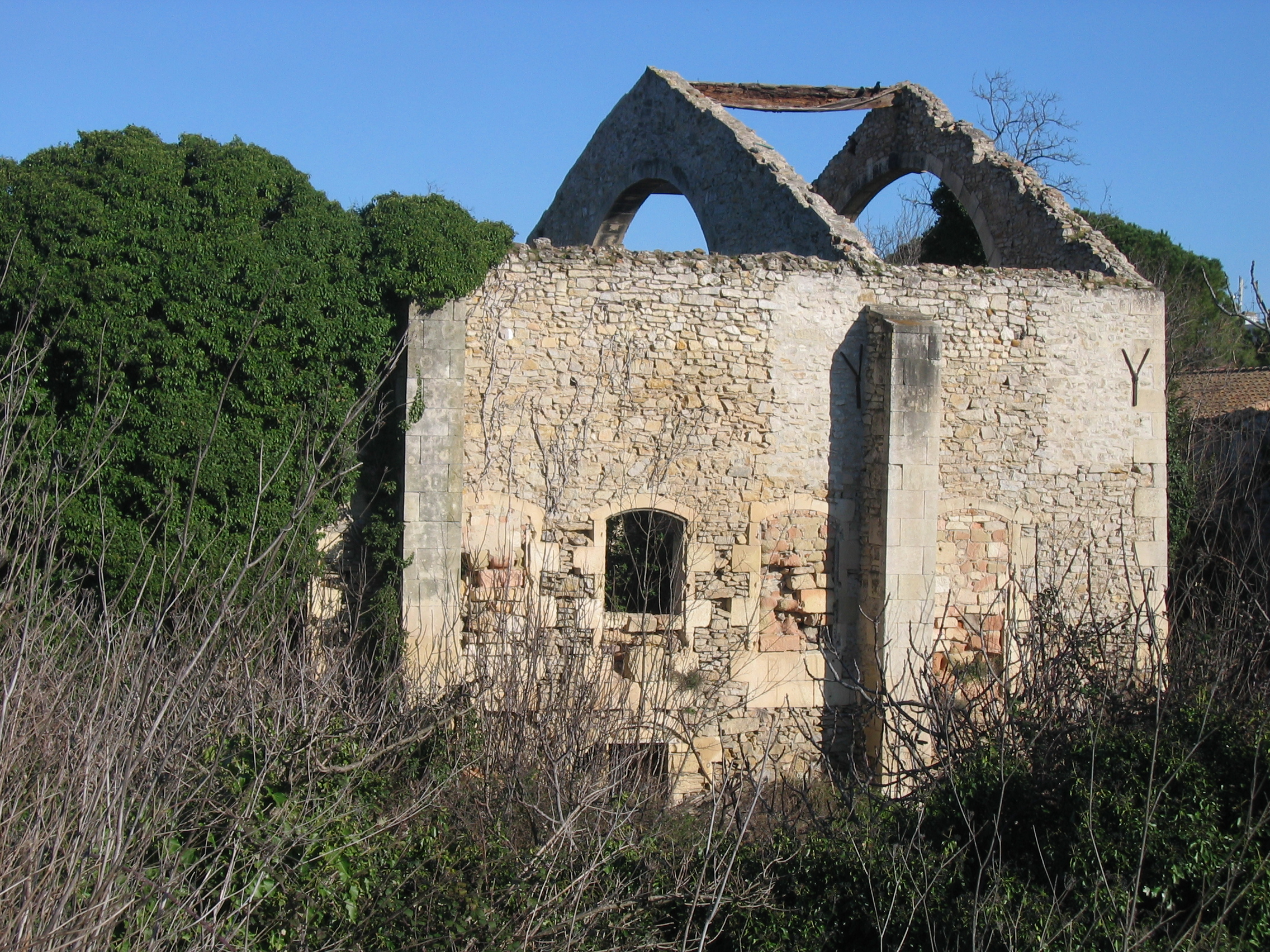 Autre vision des restes de la grande halle.